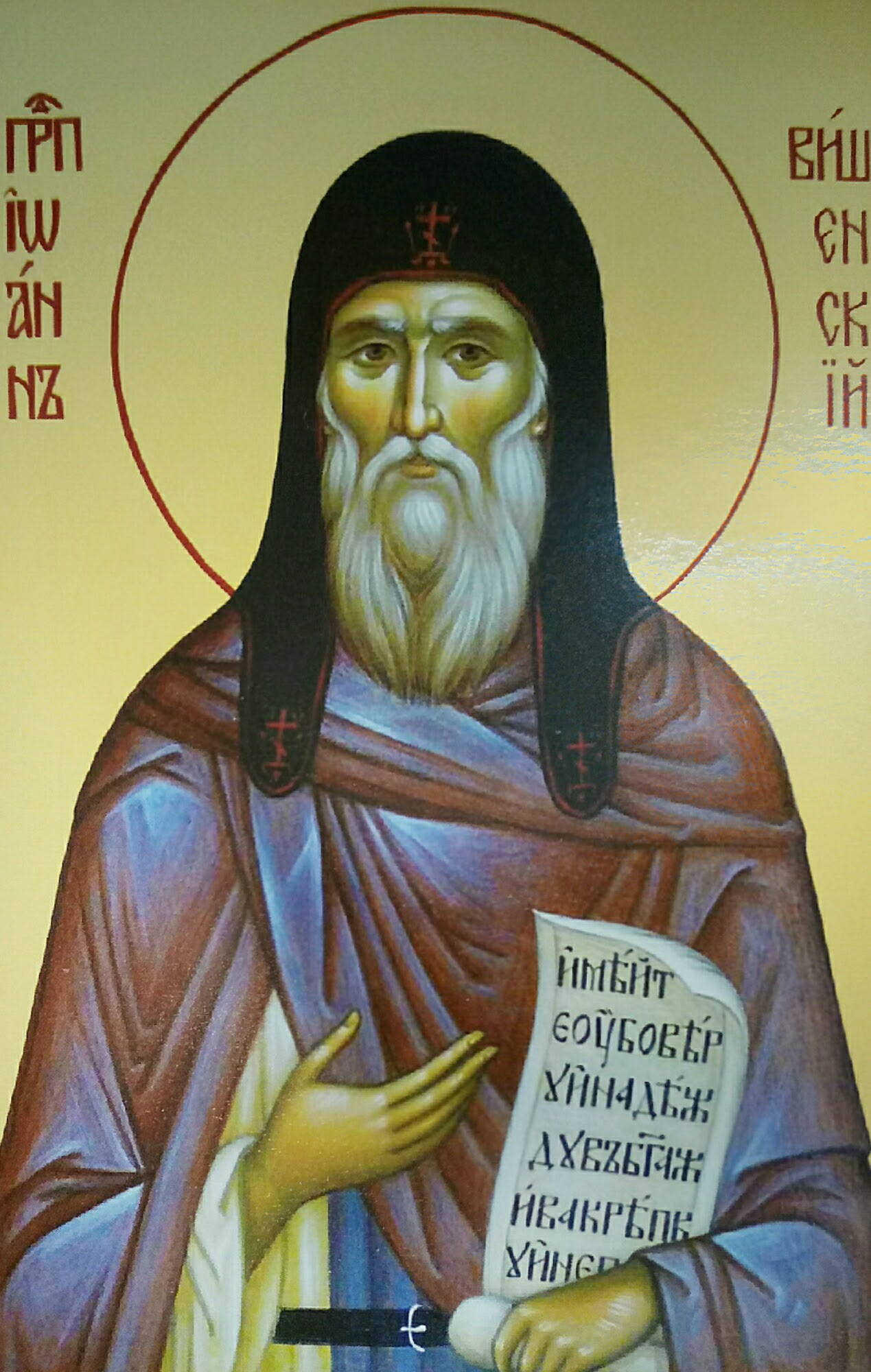 Преподобний Іван Вишенський